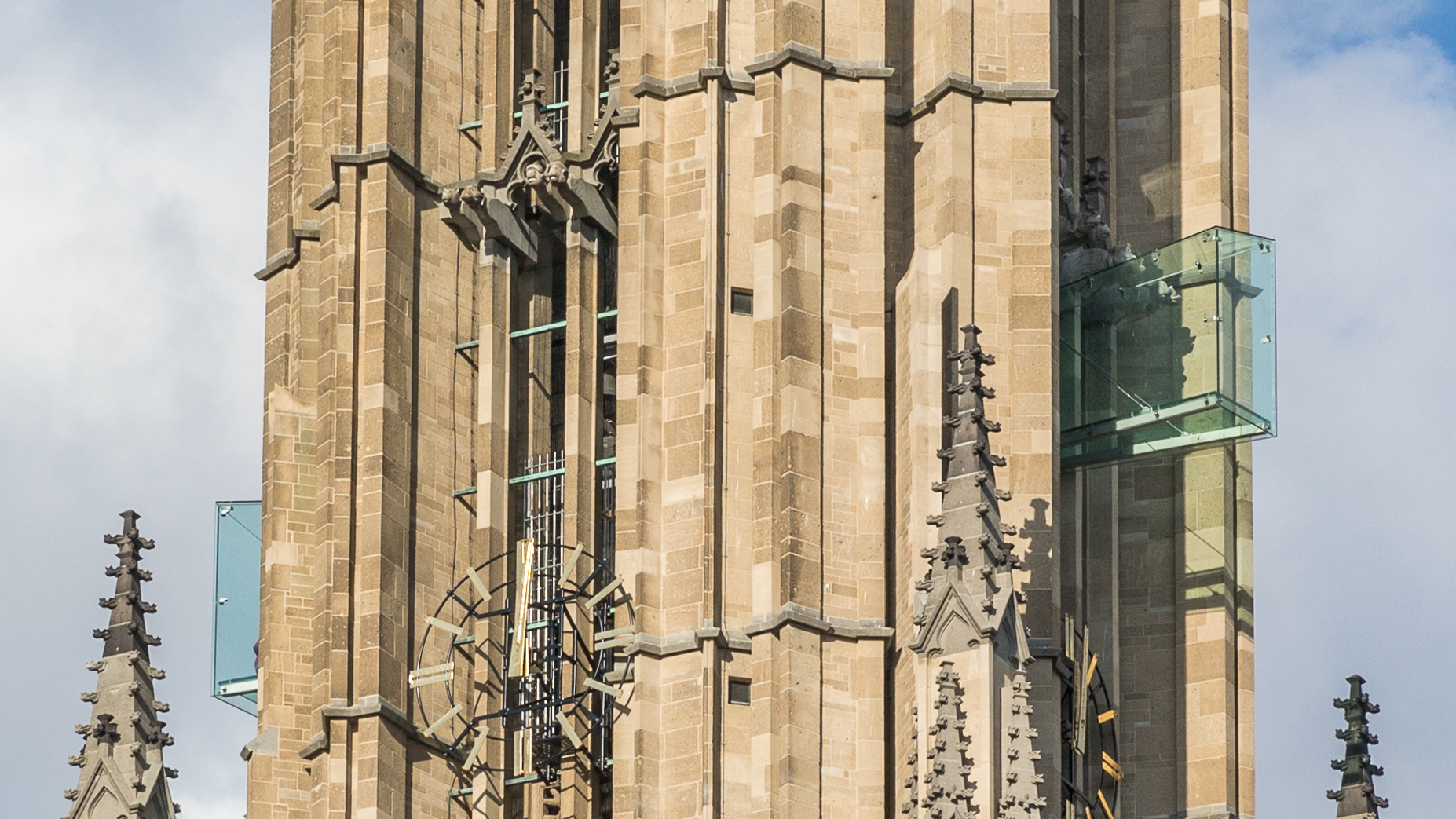 Glazen balkon, Sint-Eusebiuskerk Arnhem